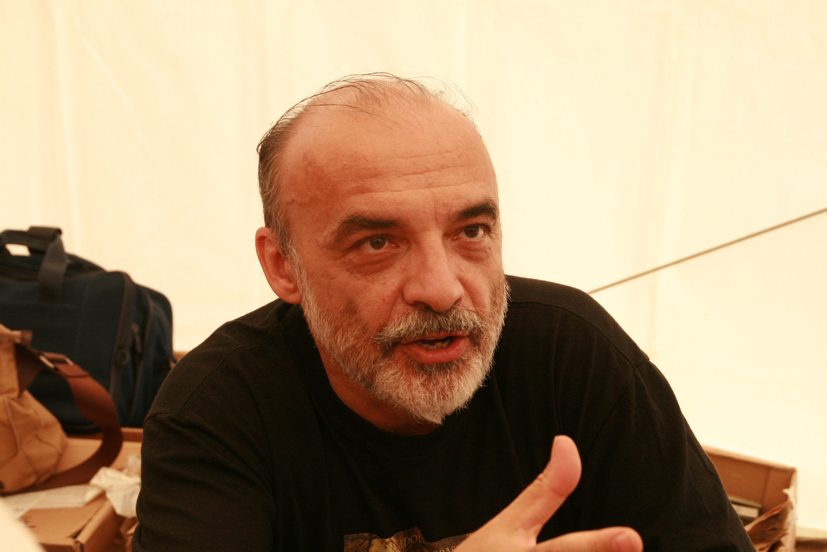 L'écrivain français Edouard Brasey